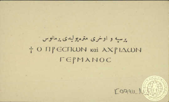 Писмо на Германос Сакеларидис